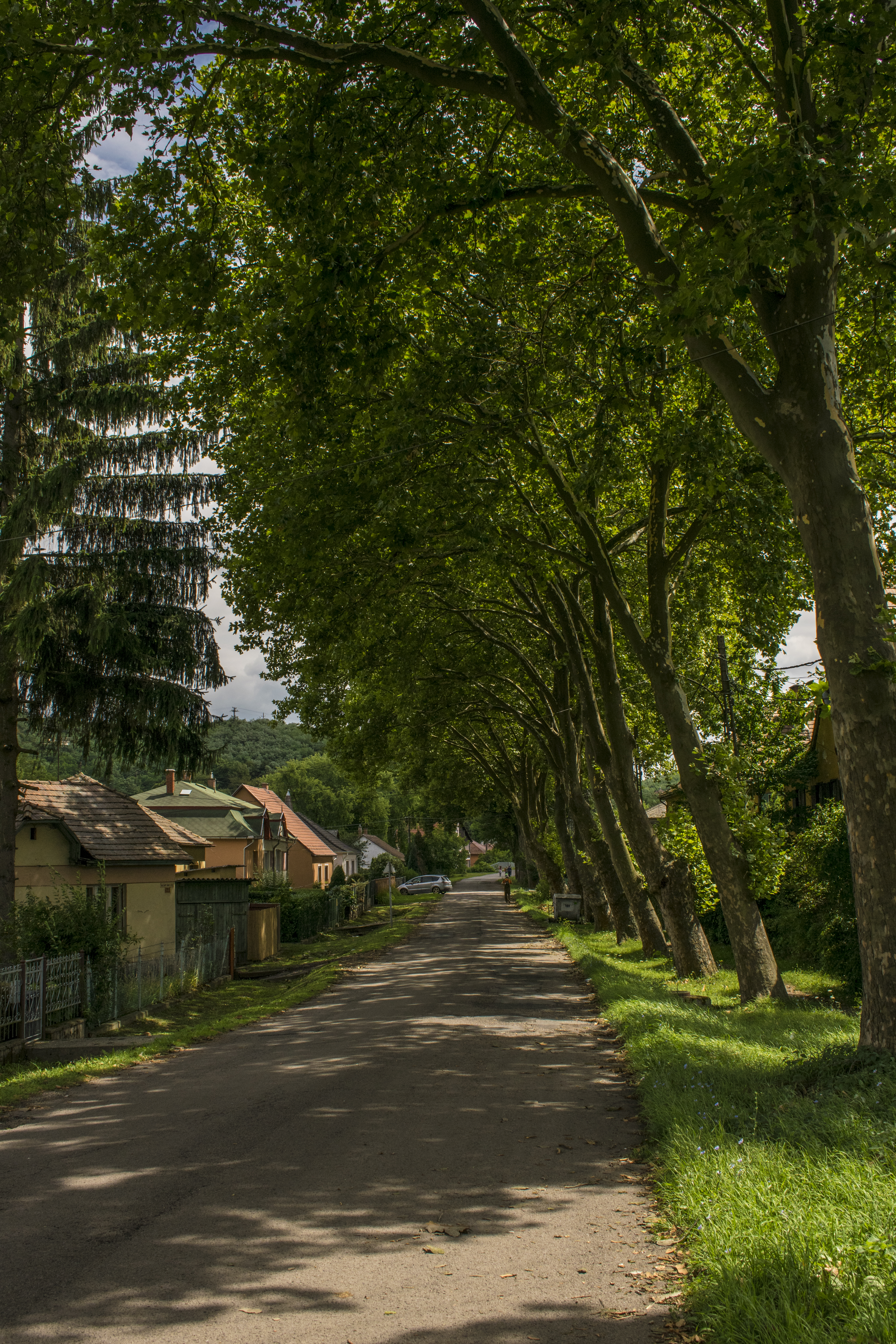 Zagyvapálfalva egyik utcája a Batsányi utca hangulatos fasorral